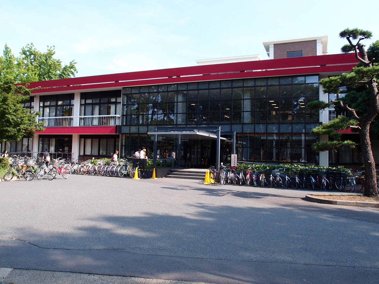 鳥取大學中央圖書館，攝於2012年7月26日。